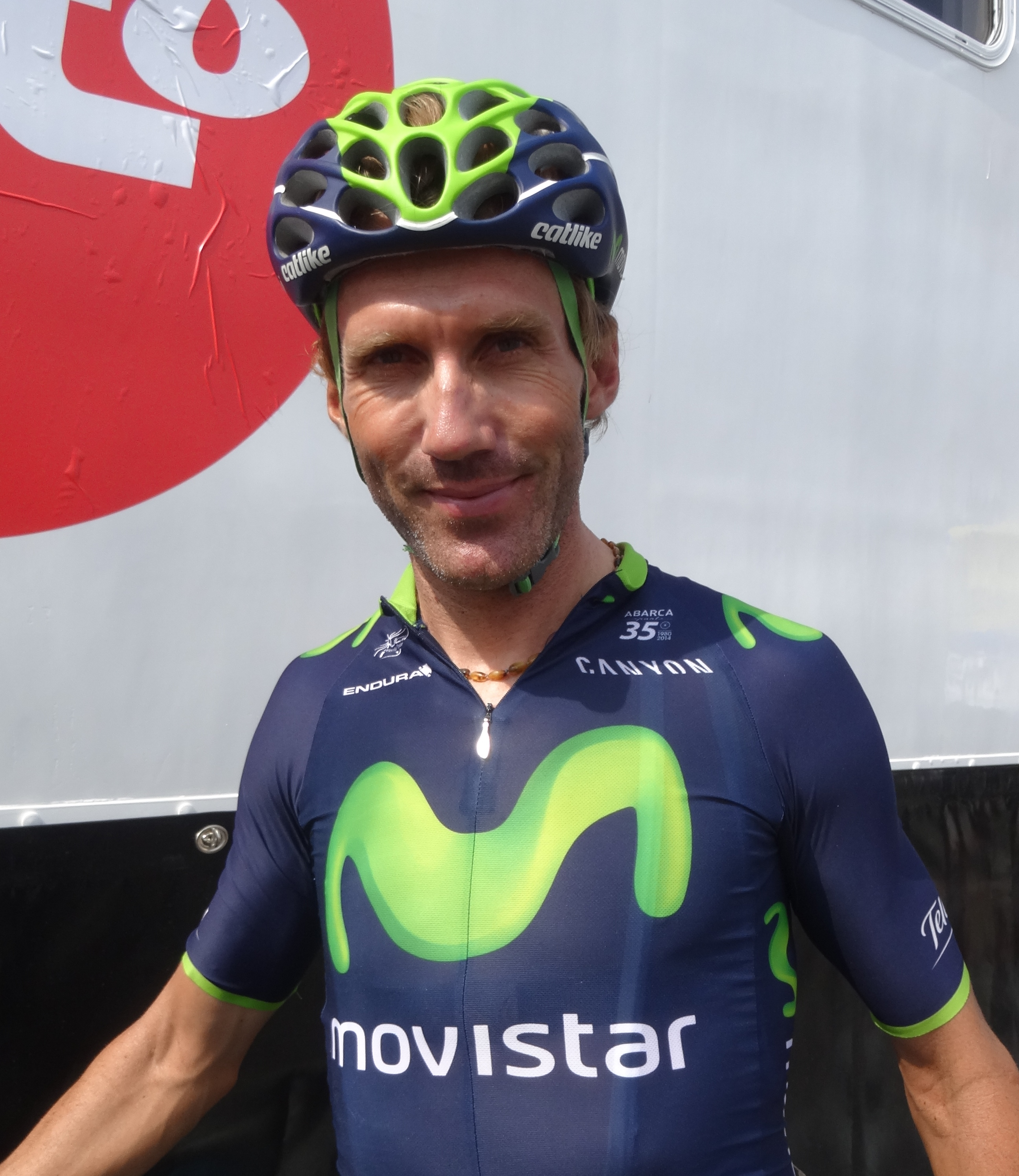 Reportage photographique réalisé le dimanche 27 juillet à l'occasion du départ de la deuxième étape du Tour de Wallonie 2014 à Péronnes-lez-Antoing (Antoing), Belgique.